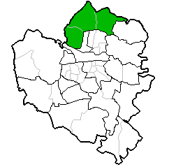 Lage vonBrackstedt-Velstove-Warmenau im Stadtgebiet Wolfsburg